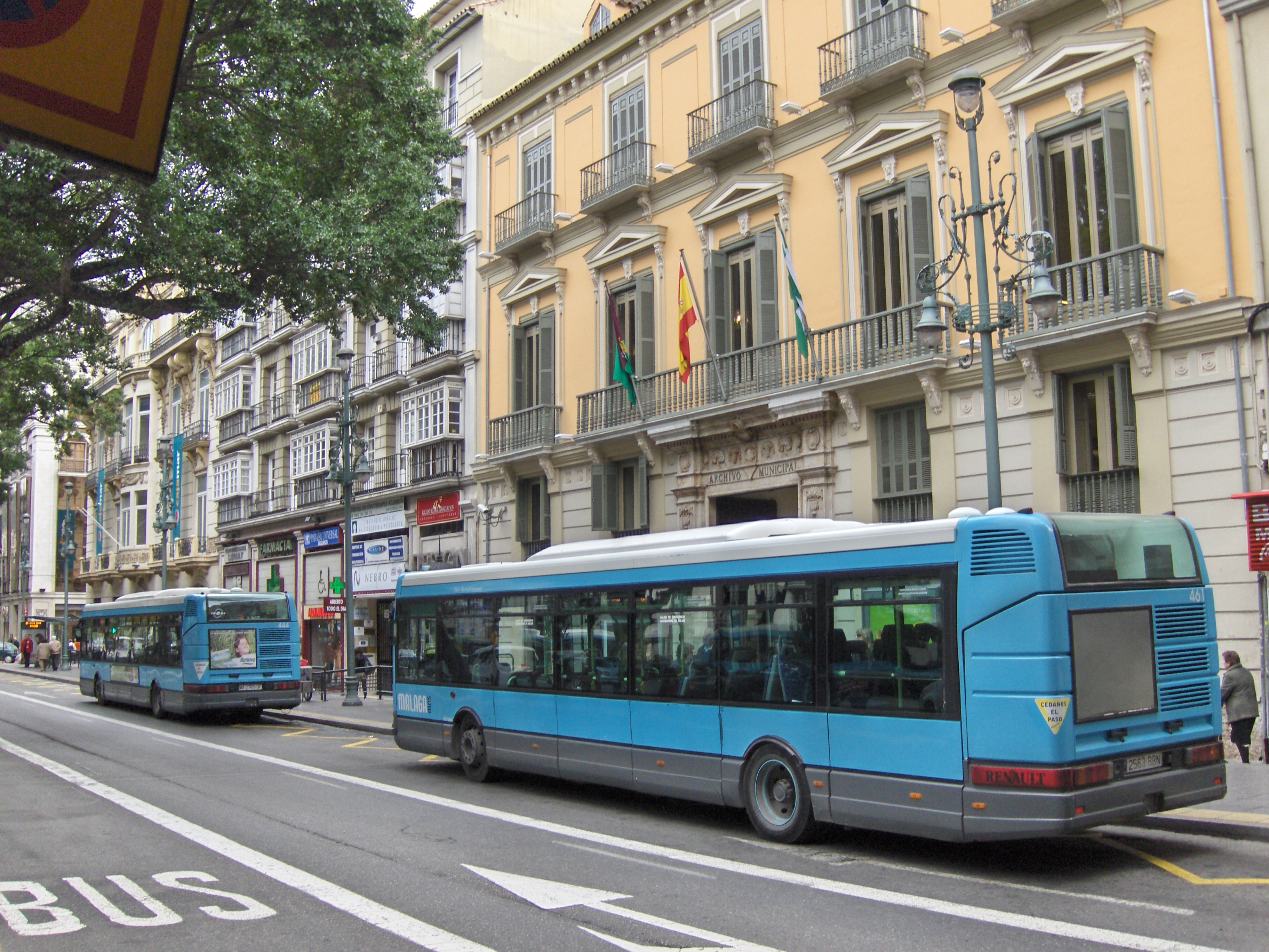 Autobuses de la EMT en la Alameda Principal, junto al Archivo Histórico Provincial, Málaga.